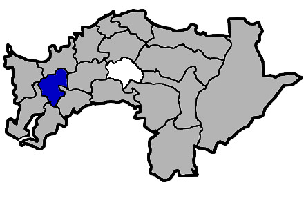 KaurJmeb為編輯臺灣省嘉義縣朴子市，於2005年2月10日所繪。